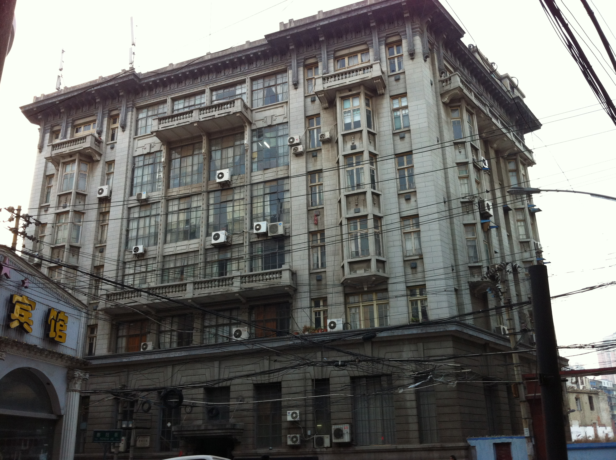 汉口景明大楼